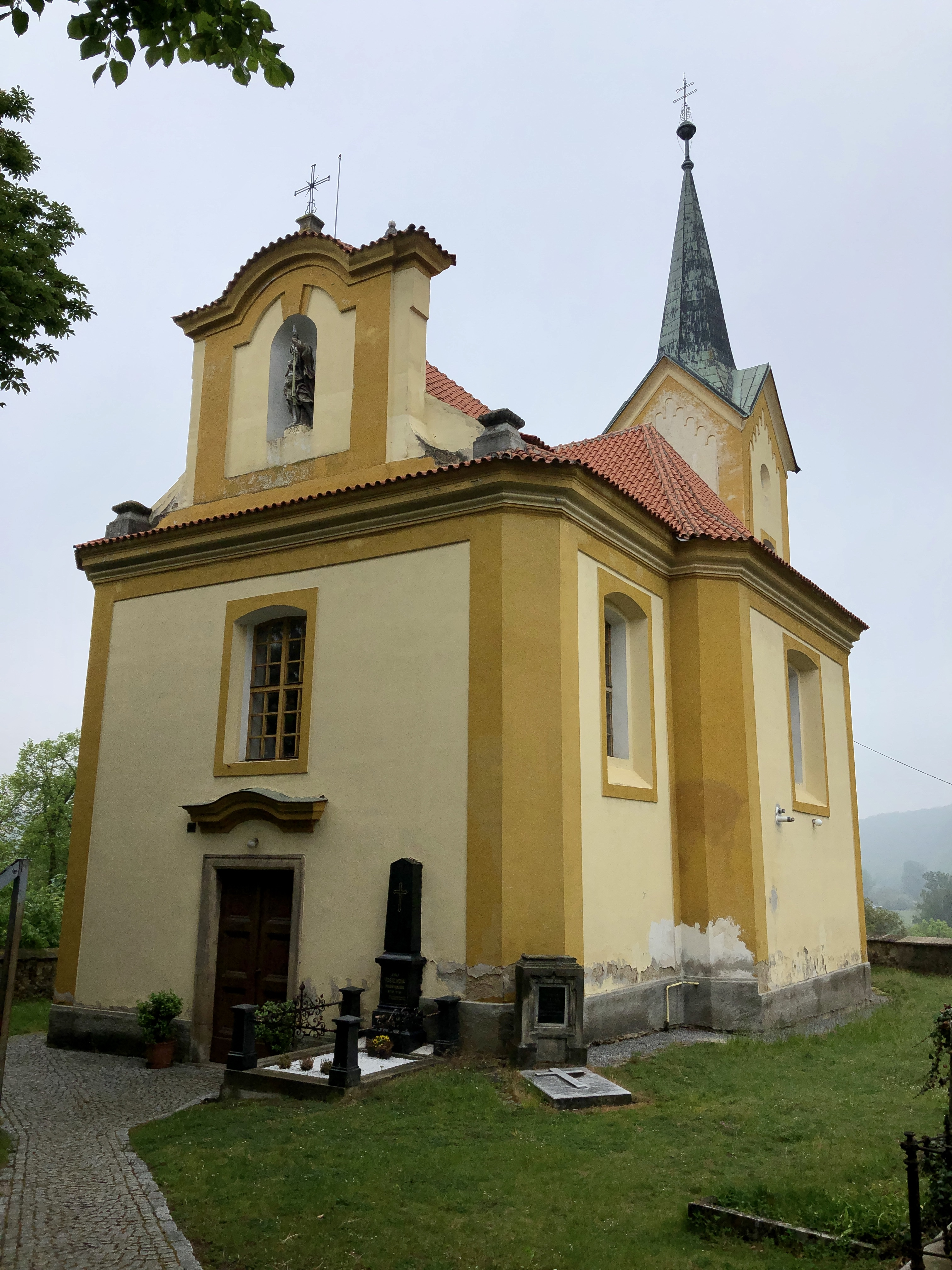 Pohled na kostel sv. Václava od hlavního vchodu